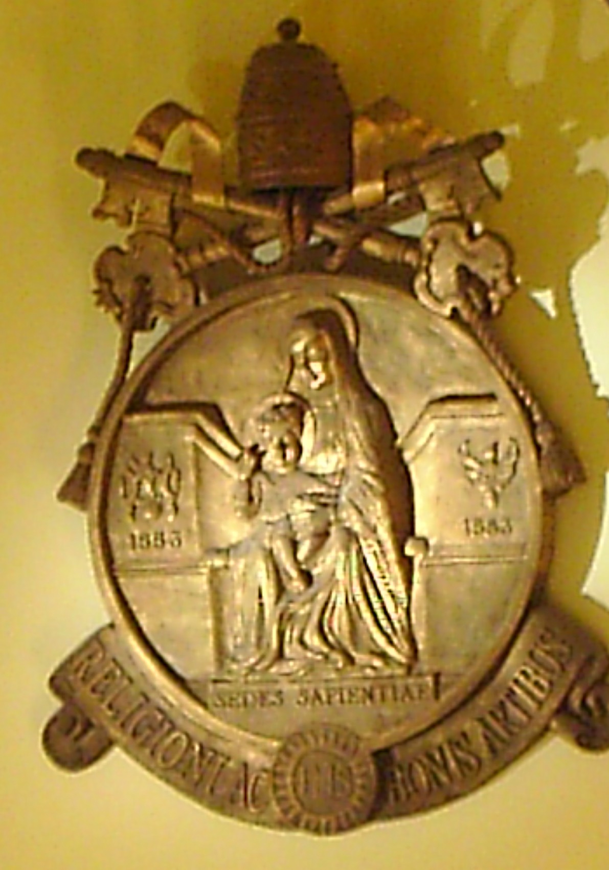 Escudo de la Pontificia Universidad Gregoriana de Roma